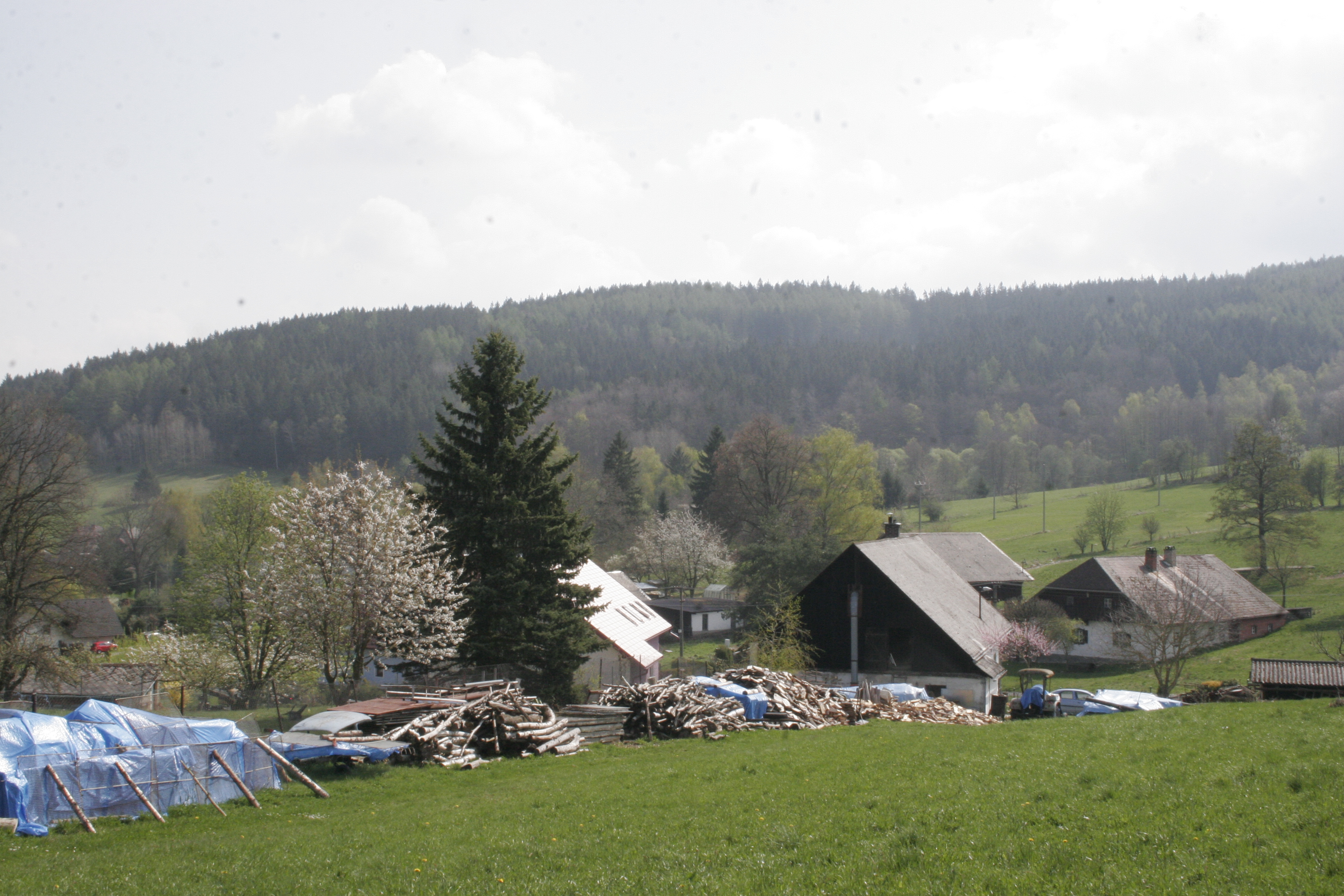 obec Skelná Huť (Chudenín),okres Klatovy, Česká republika.